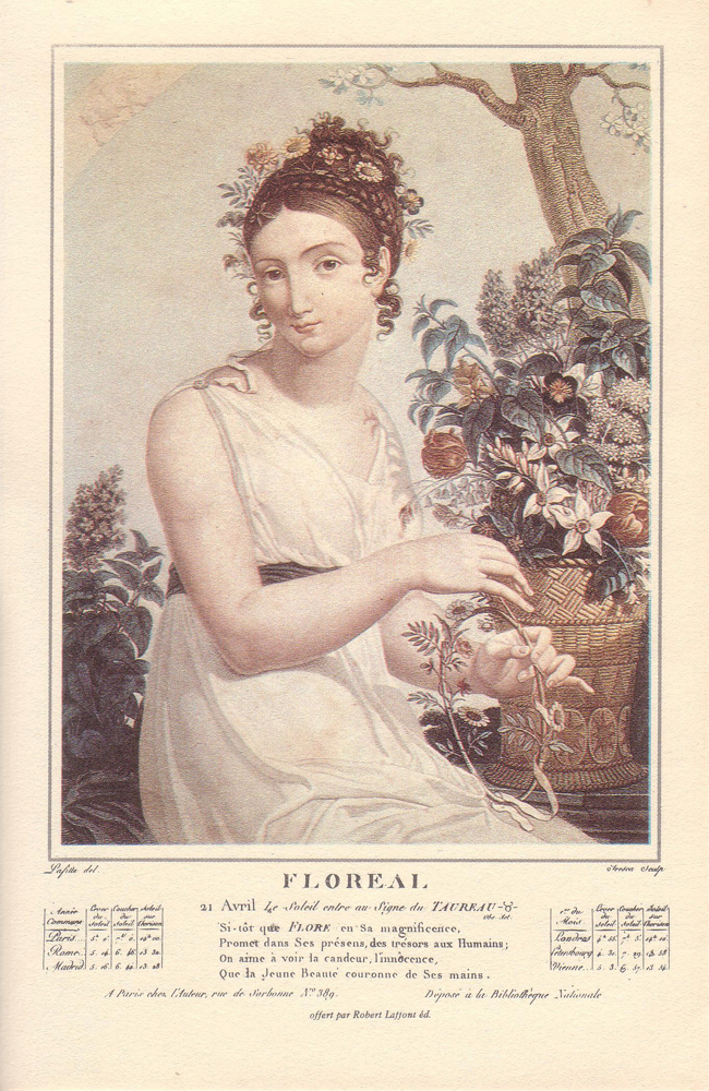 French Revolutionary Calendar FLOREAL 21 Avril: Le Soleil entre au signe du Taureau Sitôt que FLORE en sa magnificence, Promet dans Ses présens des trésors aux Humains On aime à voir la candeur l'innocence Que la Jeune Beauté couronne de Ses mains